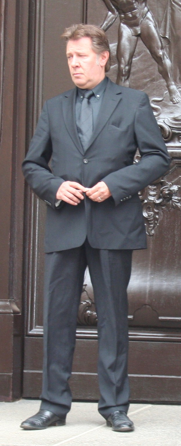 Jan Fedder vor dem Hamburger Michel